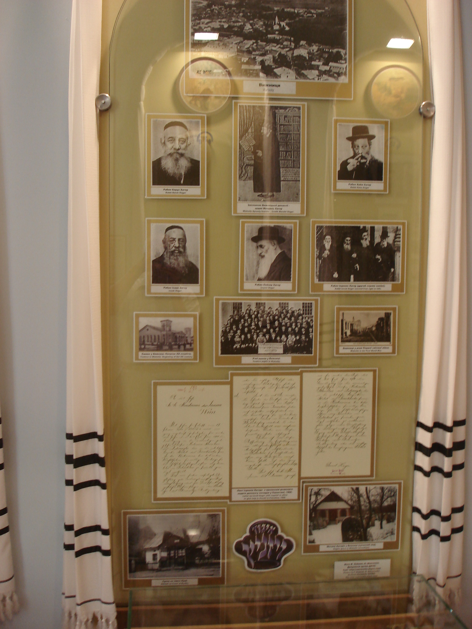 фрагмент експозиції музею